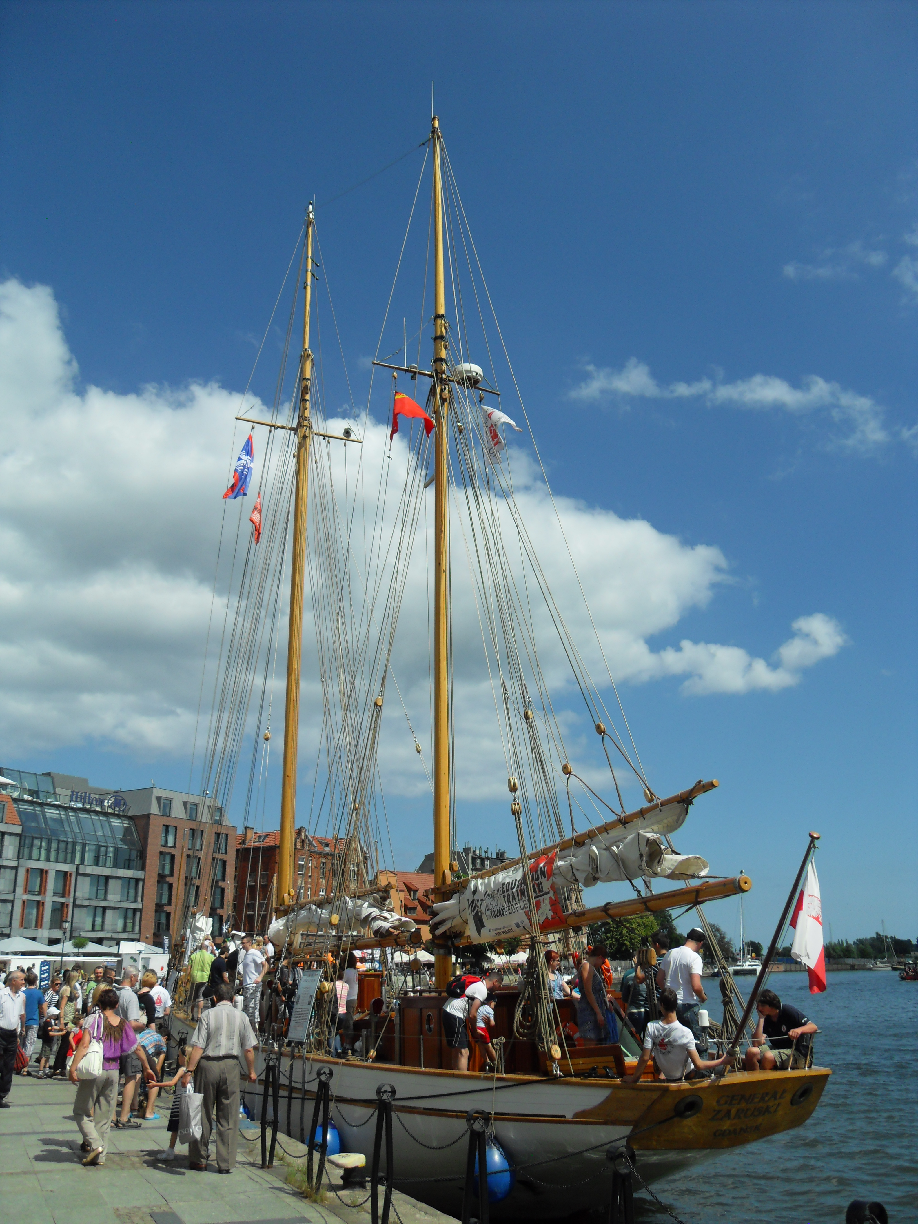 Gdańsk Główne Miasto. Rybackie Pobrzeże, "Generał Zaruski" (po remoncie) na Motławie. Baltic Sail 2013.